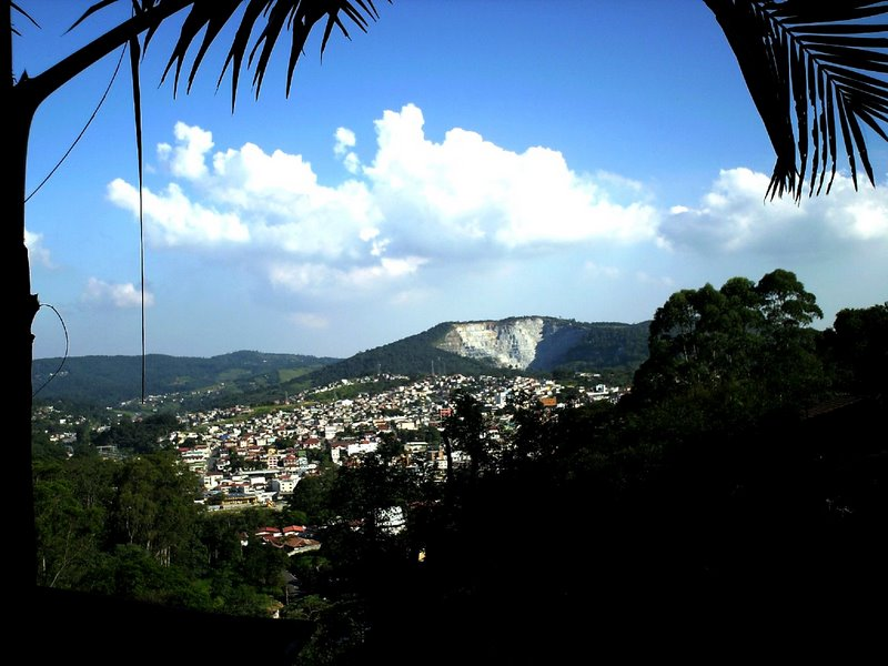 Centro da cidade de Mairiporã em São Paulo-Brasil.